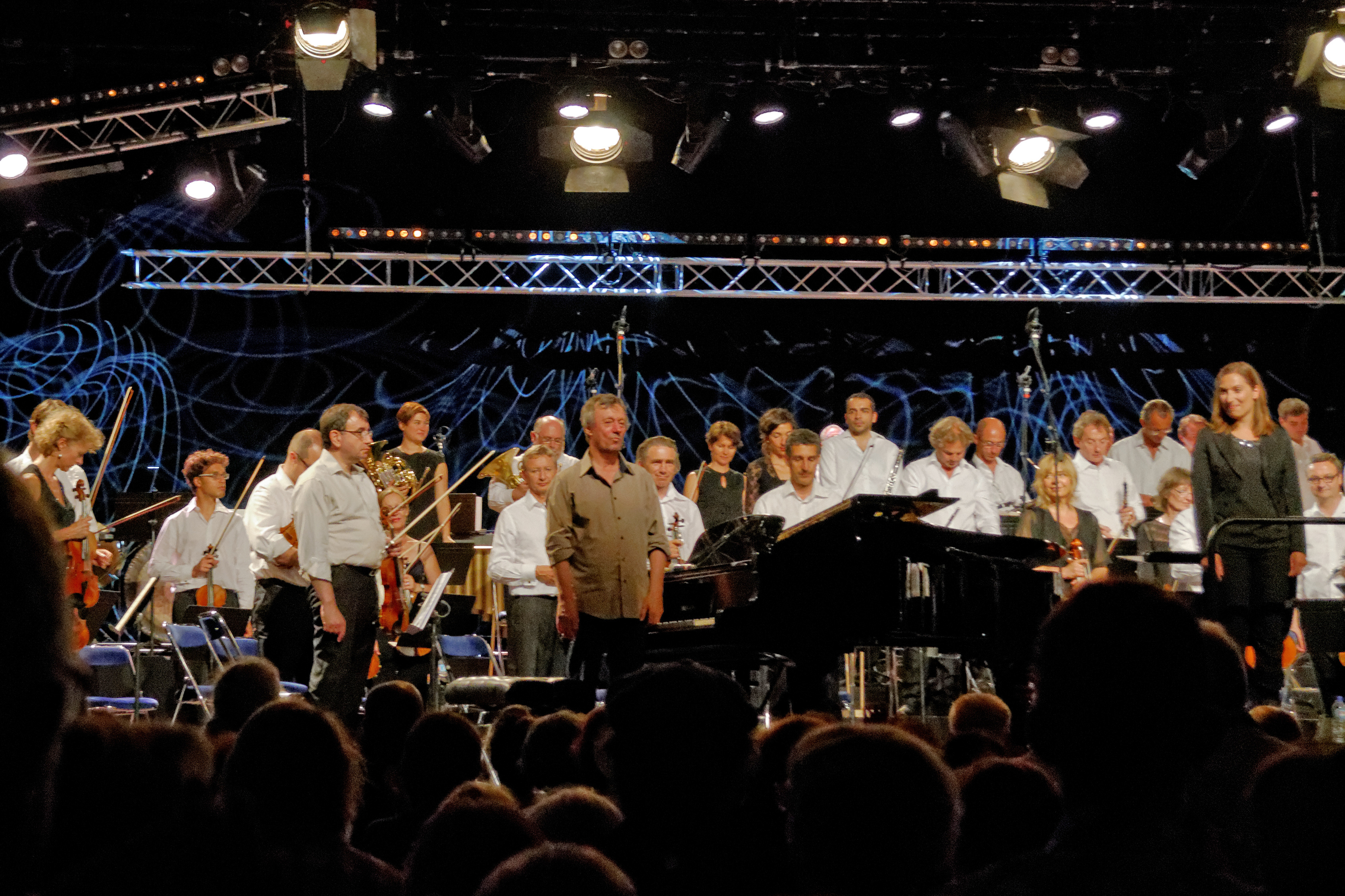 Didier Squiban et l'Orchestre symphonique de Bretagne pour sa Symphonie N°3 "Le Ponant" lors du festival de Cornouaille à l'espace Gradlon le 25 juillet 2014.